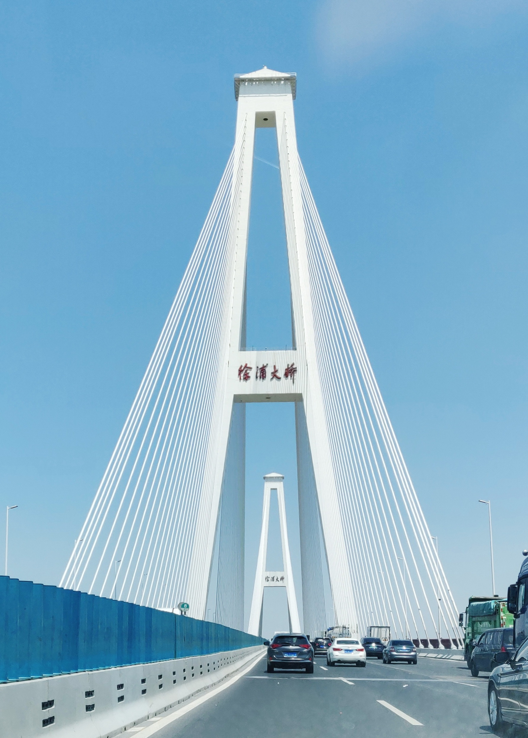 中文（中国大陆）: 徐浦大桥西向东，西塔西侧往东行驶。